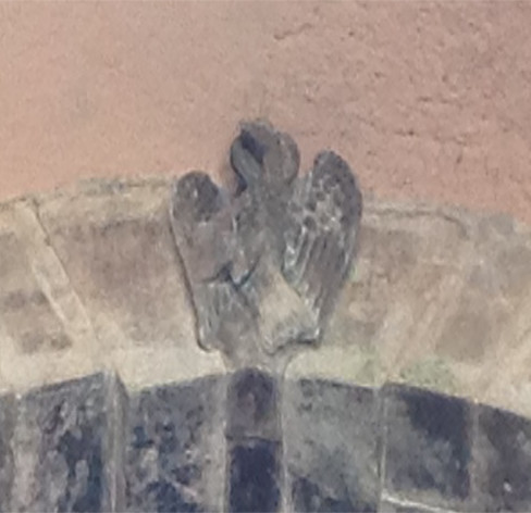 La chiave di volta dell'arco tra la prima e la seconda campata interne del basamento del campanile, con la scultura dell'aquila (simbolo dell'evangelista Giovanni) e l'iscrizione NICO LA·N/ANGE LU·RO/MANU MAGI/STER·M FECIT.